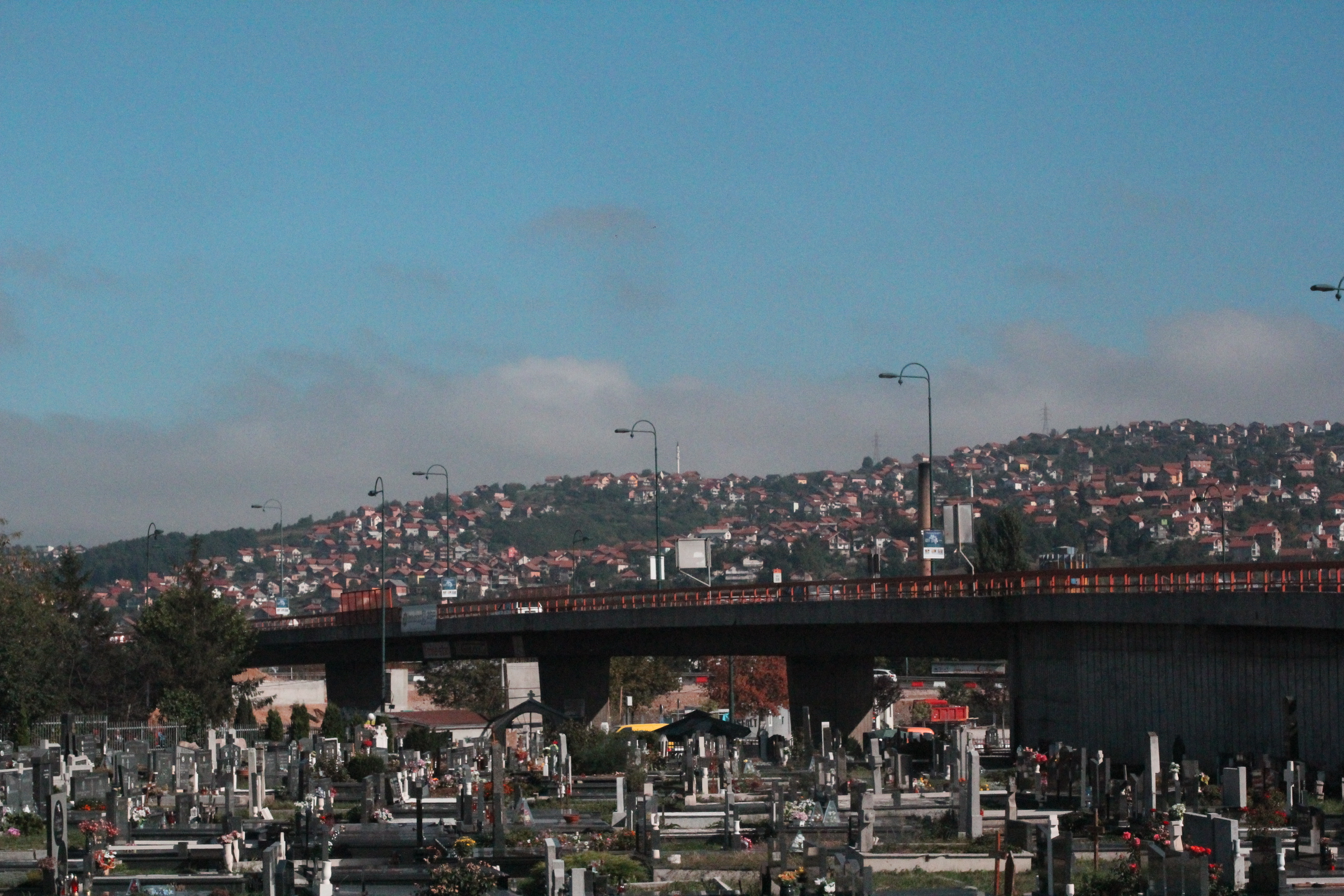 sarajevo